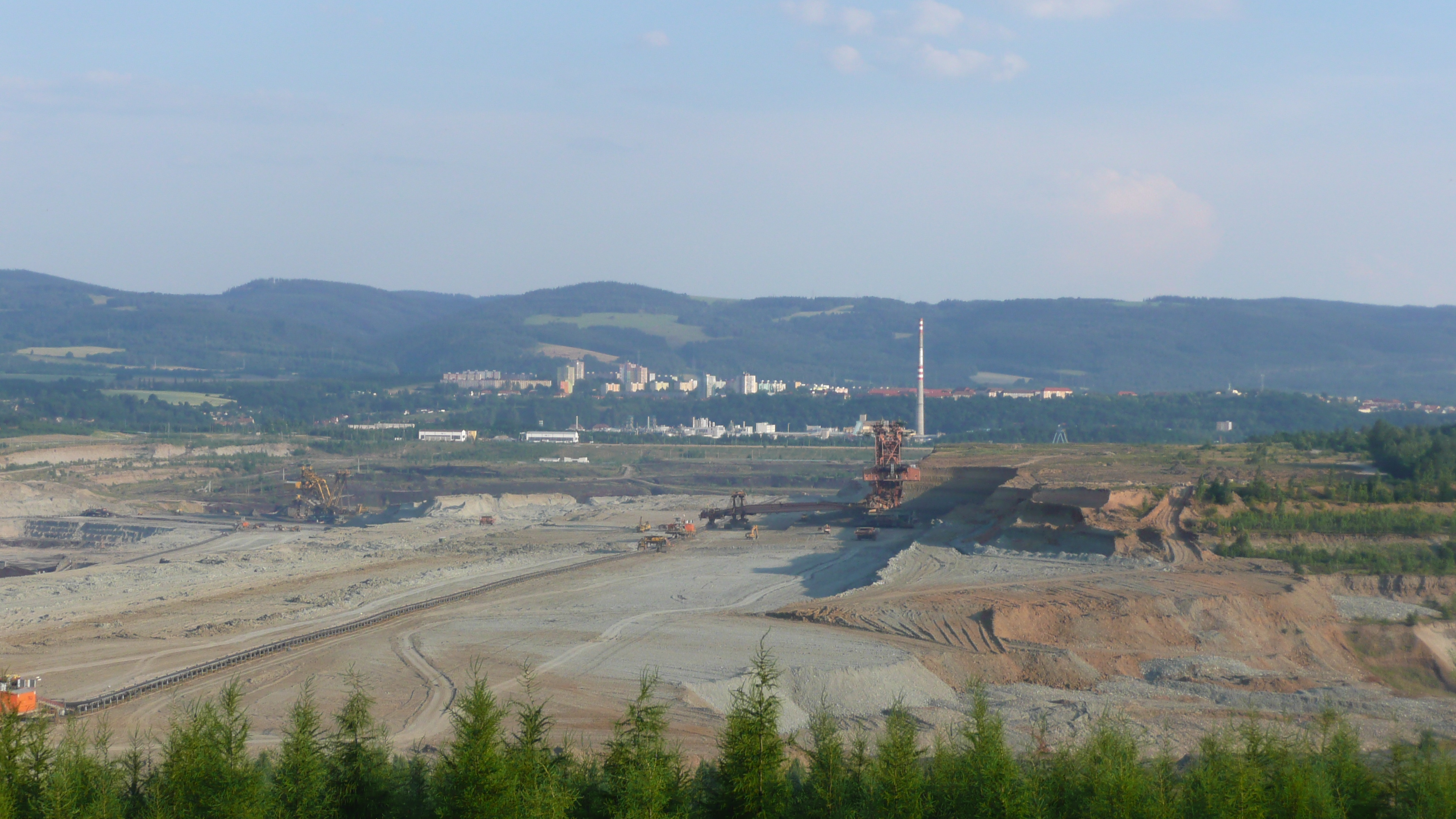 Důl Jiří, pohled na Sokolov.